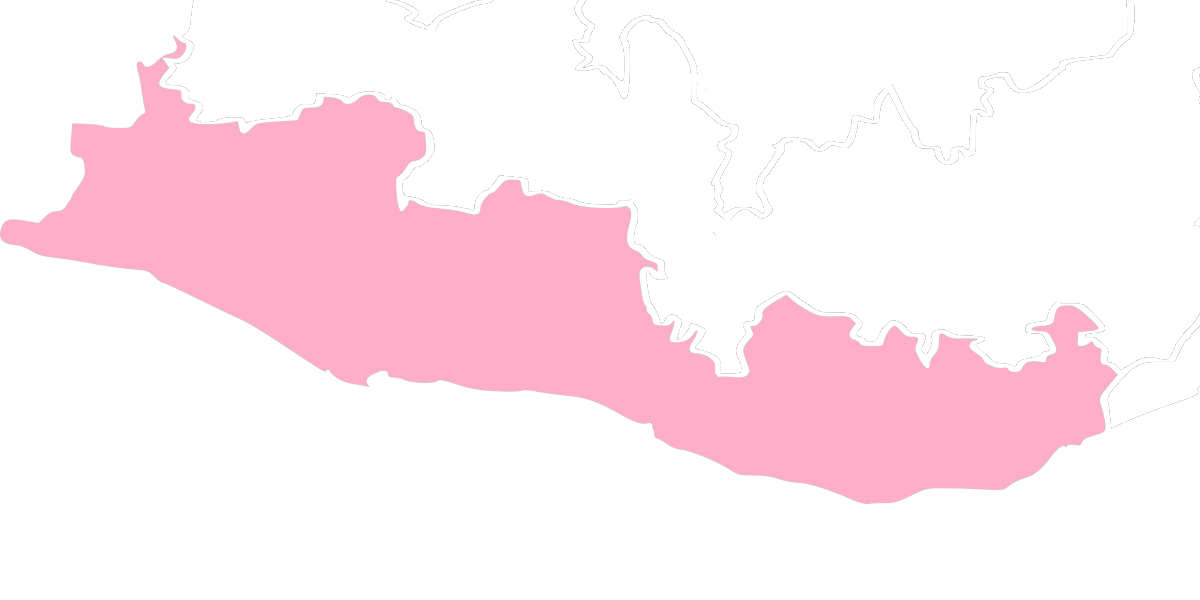 Región Costa, una de las ocho regiones que conforman al estado mexicano de Oaxaca.